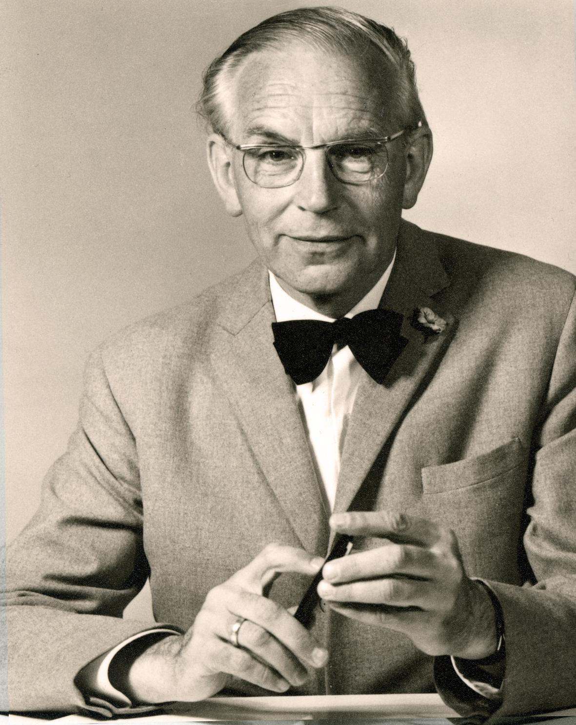 Architekt Jan Wilhelm Prendel, Aufnahme ca. 1980